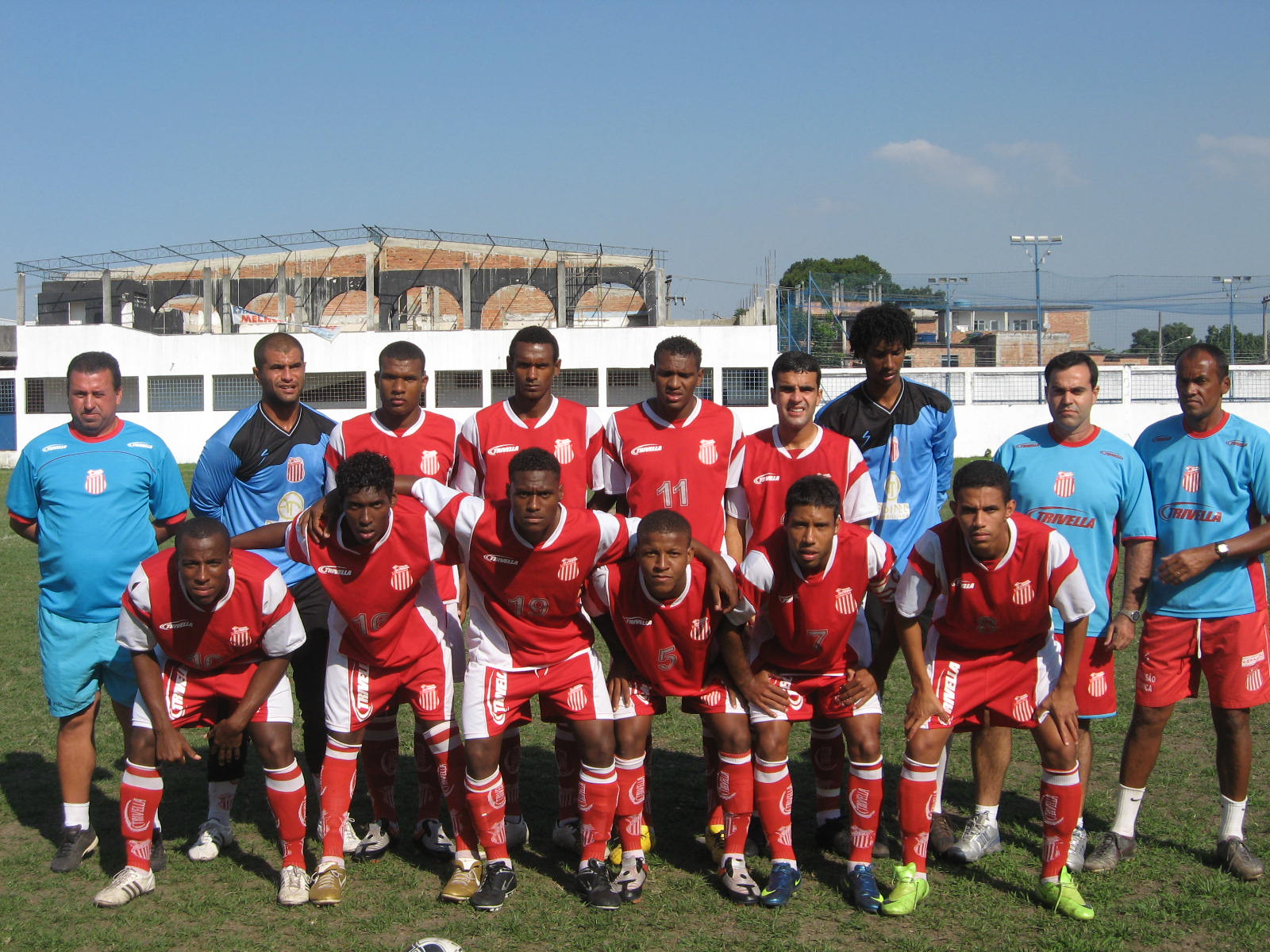 Equipe do Bela Vista Futebol Clube, em 2009